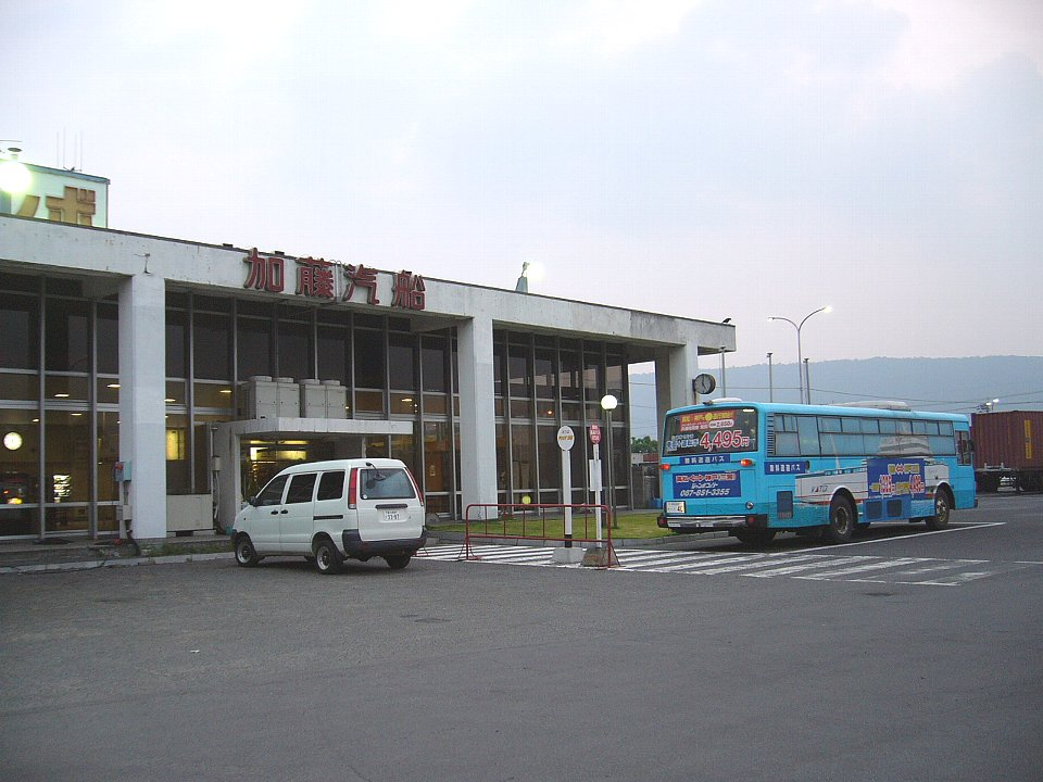 ジャンボフェリー 高松東港のりば 右側に高松駅への無料送迎バスが待機中